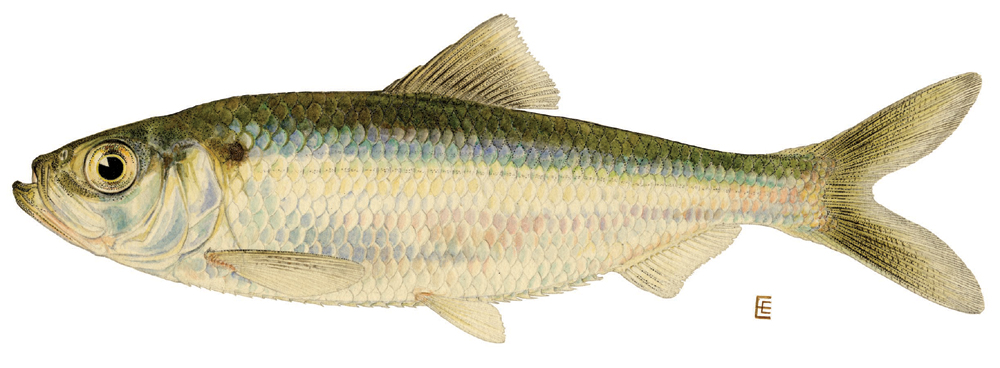 Alewife (Alosa pseudoharengus)